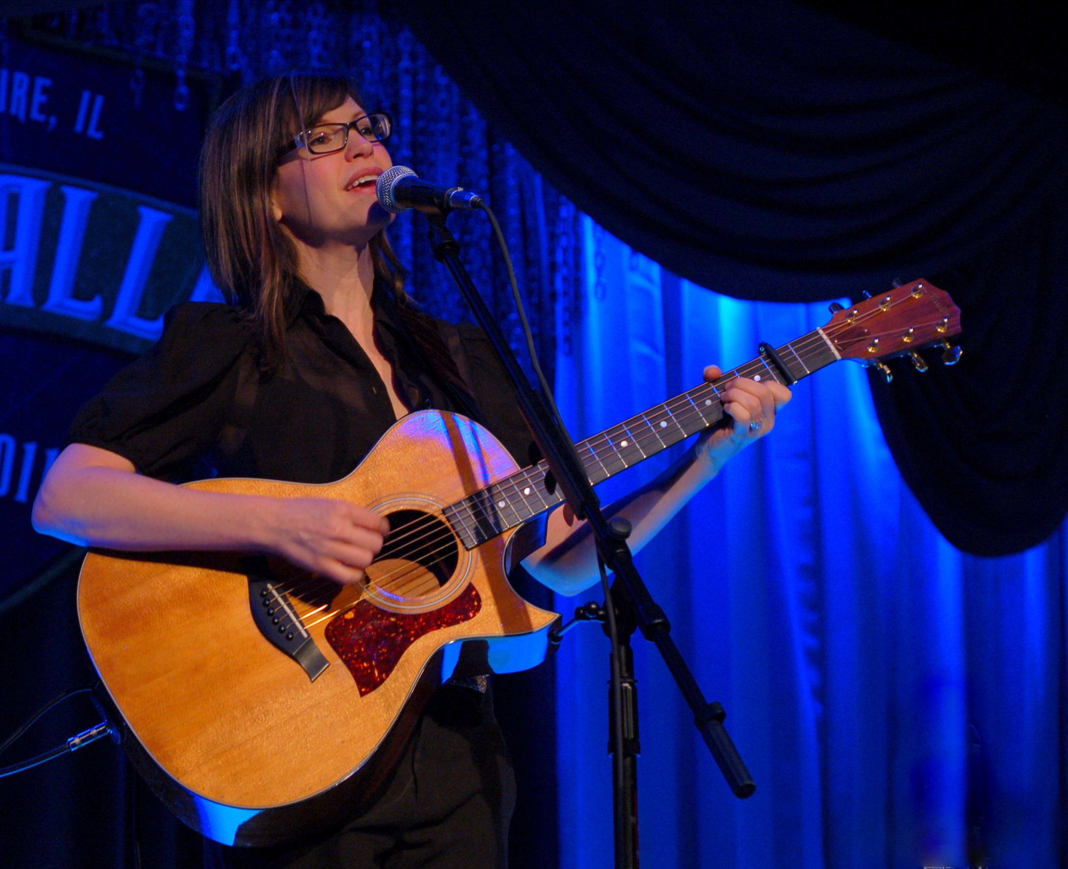 Lisa Loeb